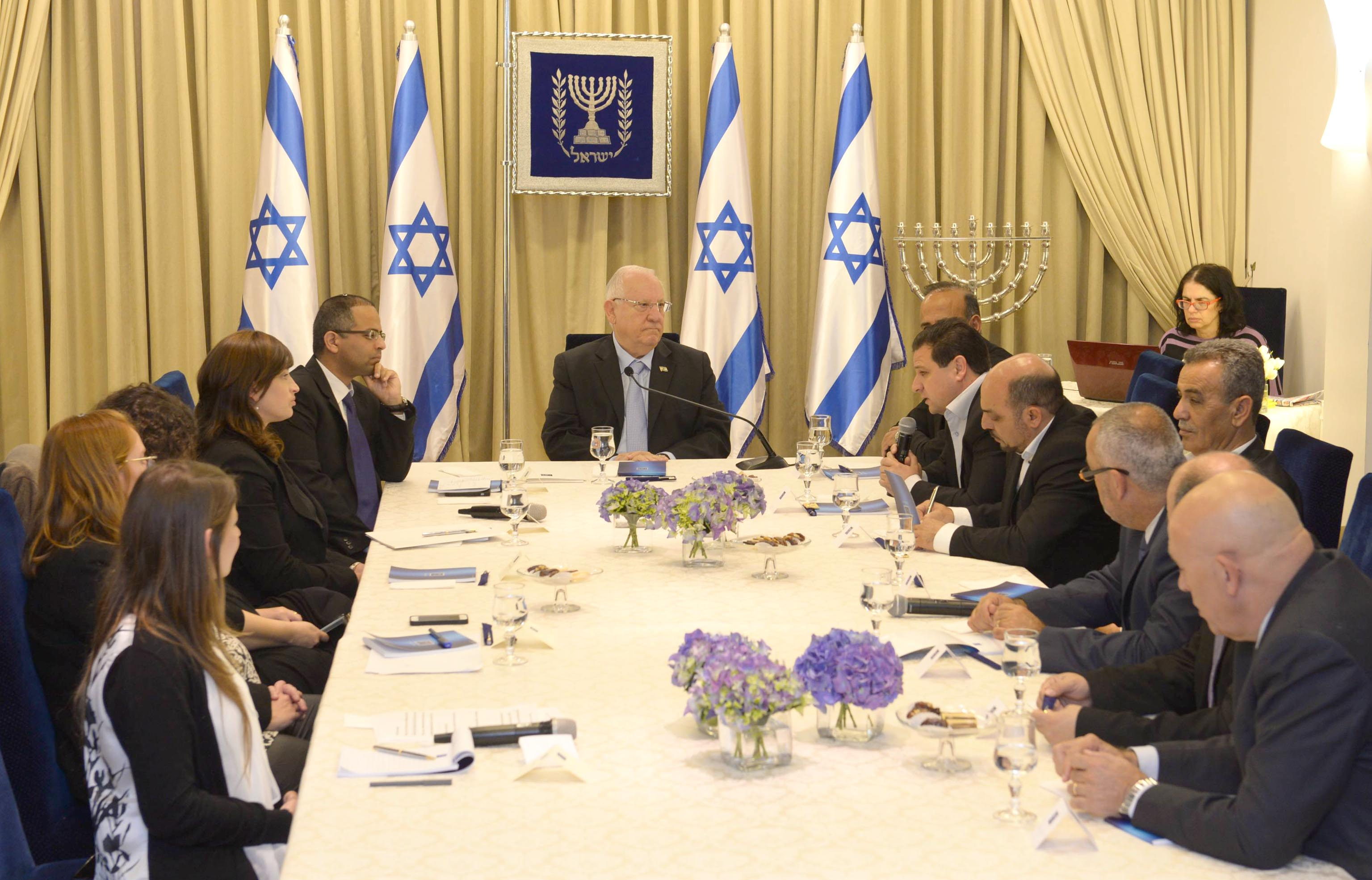 נשיא מדינת ישראל ראובן ריבלין פותח בהתייעצויות עם המפלגות השונות לקראת הרכבת הממשלה לאחר בחירות מרץ 2015 עם הרשימה המשותפת